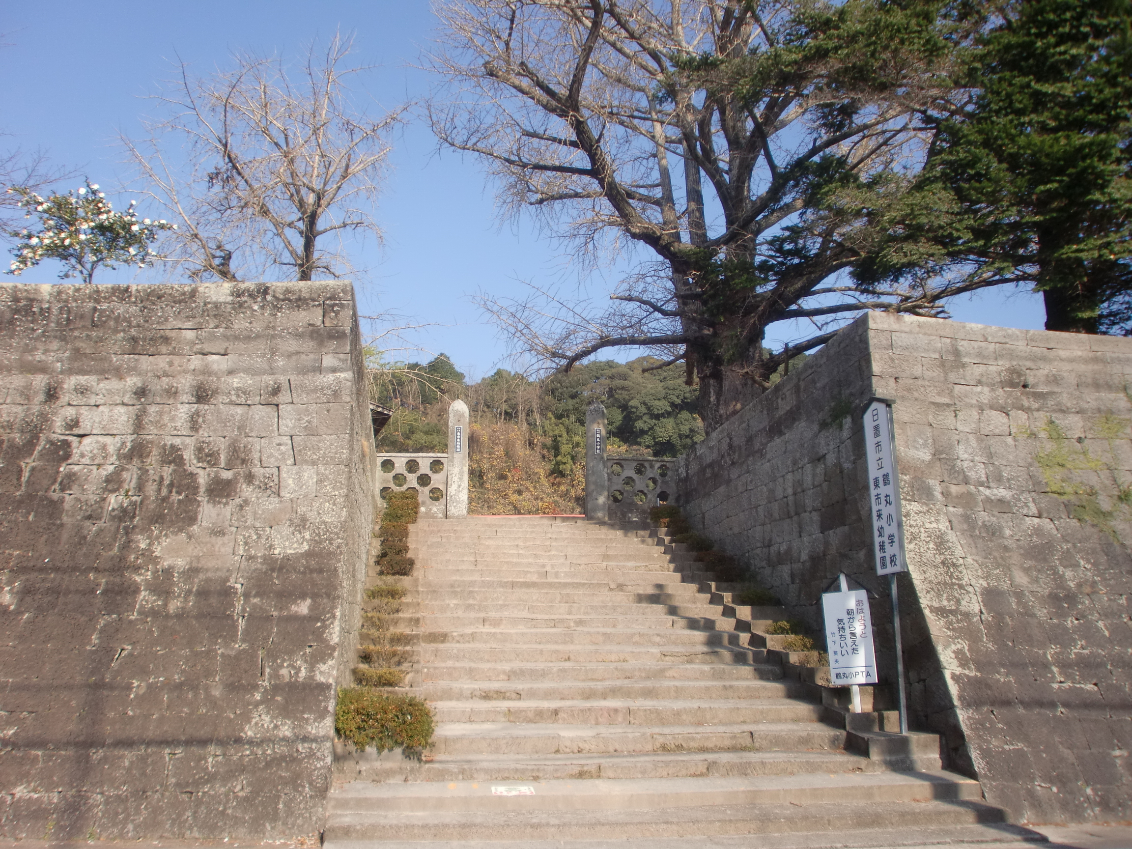 日置市立鶴丸小学校の外観。